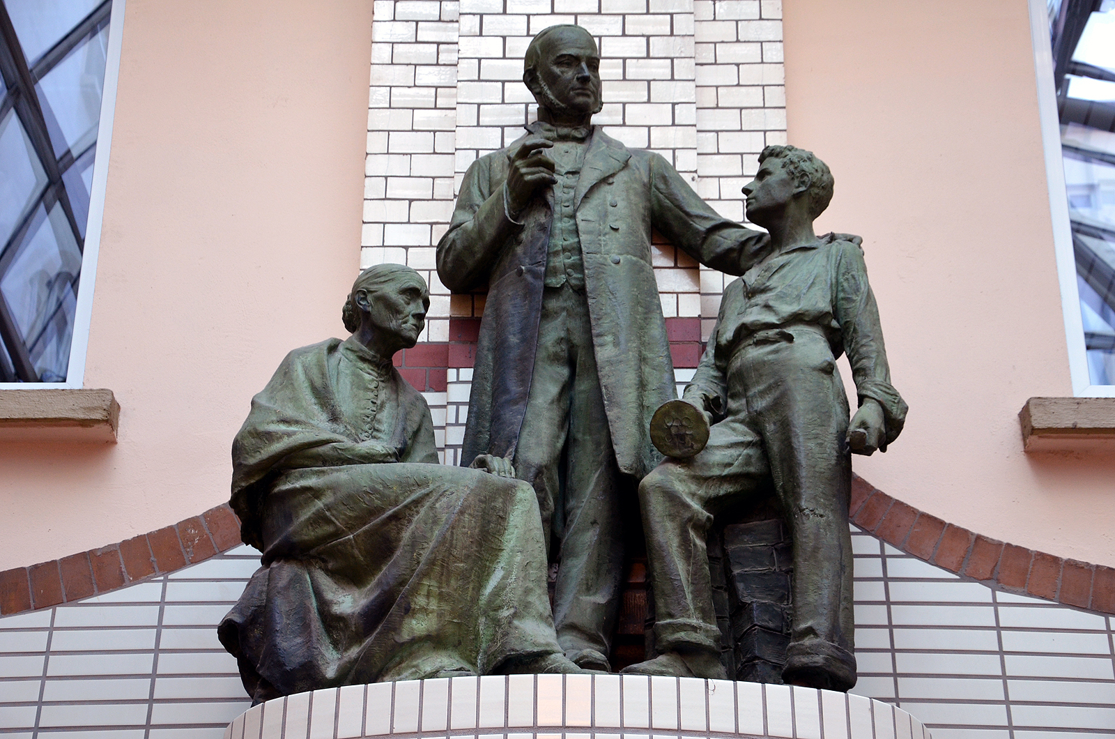 Ursprünglich um 1900 aufgestellte Skulpturen-Gruppe des Bildhauers Karl Gundelach, heute in den Lange'schen Höfen (Galerie Luise in Hannover): Die lebensgroßen Bronze-Figuren zeigen in der Bildmitte den Stifter Karl Lange, der seine Hand auf die Schülter seines Schützlings legt, einem verwaisten Steinmetz-Lehrling. Links daneben eine alte Witwe eines Bildhauers, die ebenfalls zur Zielgruppe der Lange'schen Stiftung zählt ...